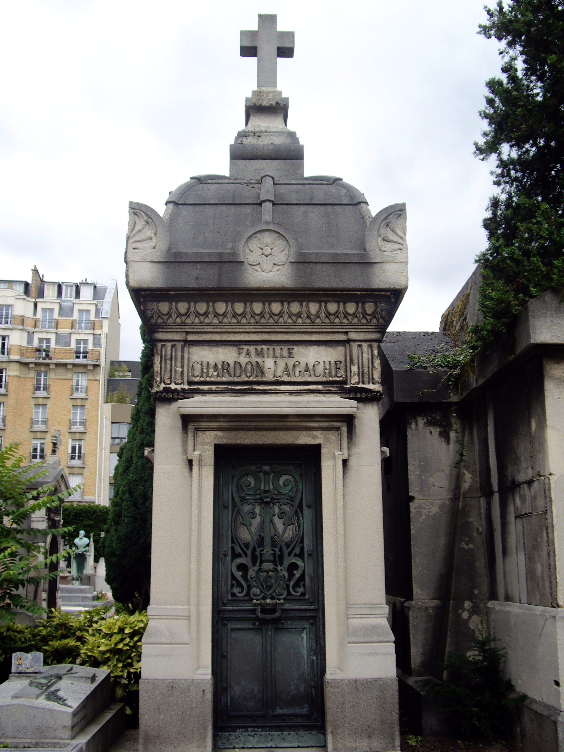 Chapelle Chardon-Lagache, cimetière d'Auteuil, division 3. Note : Les philanthropes Pierre-Alfred Chardon (1807-1879) et son épouse Marie-Pauline Lagache (1811-1887) ont donné leur nom à une rue et à une station de métro de Paris.